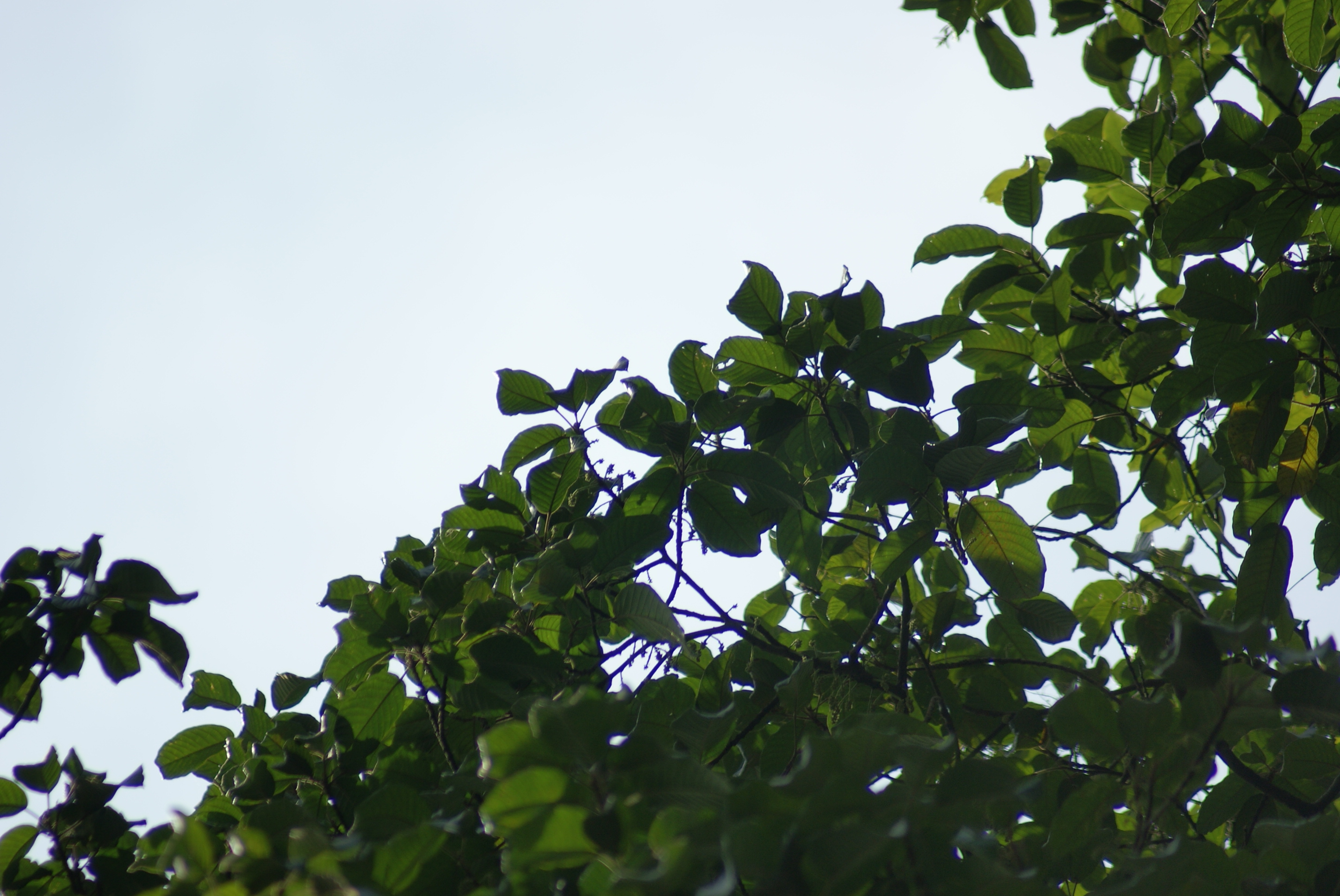 Baccaurea macrocarpa